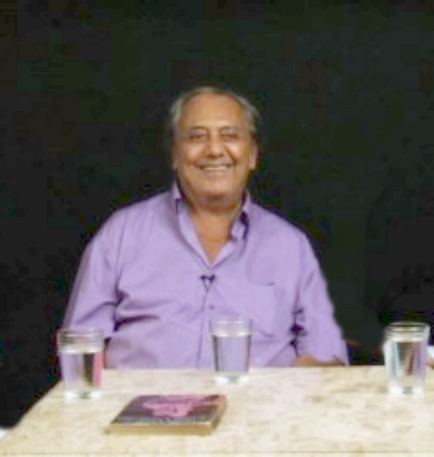 Agildo da Gama Barata Ribeiro Filho (Rio de Janeiro, 26 de abril de 1932) é um ator e humorista brasileiro.